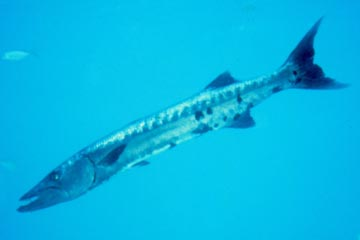 オニカマス 学名 Sphyraena barracuda、英名 Great barracuda カリブ海タークスにて。 Great barracuda - Sphyraena barracuda Public domain image published by NOAA Image ID: reef1515, The Coral Kingdom Collection Location: Turks, Caribbean Sea Photo Date: 1989 August Photographer: Dr. Anthony R. Picciolo, NOAA NODC